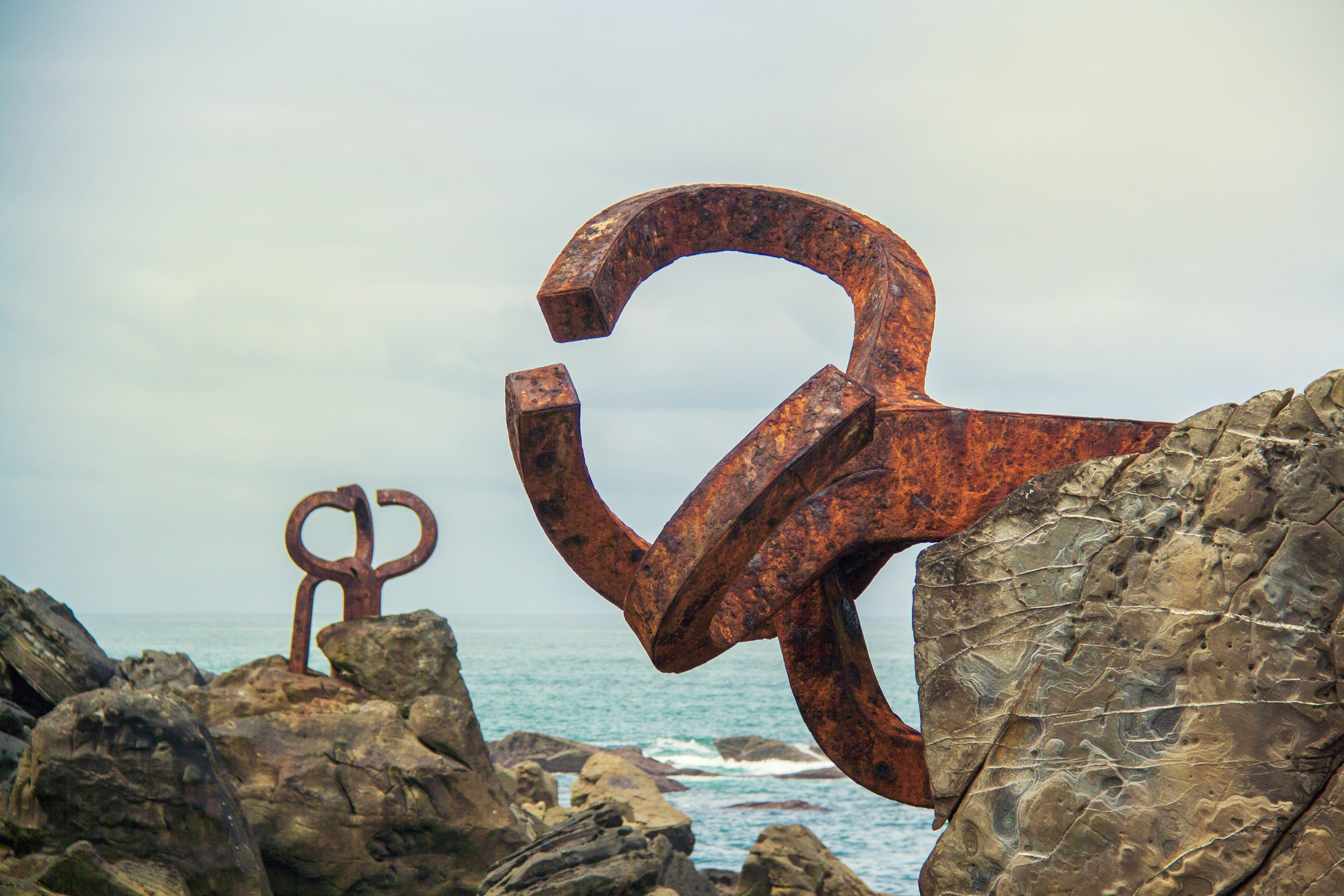 San Sebastián, España